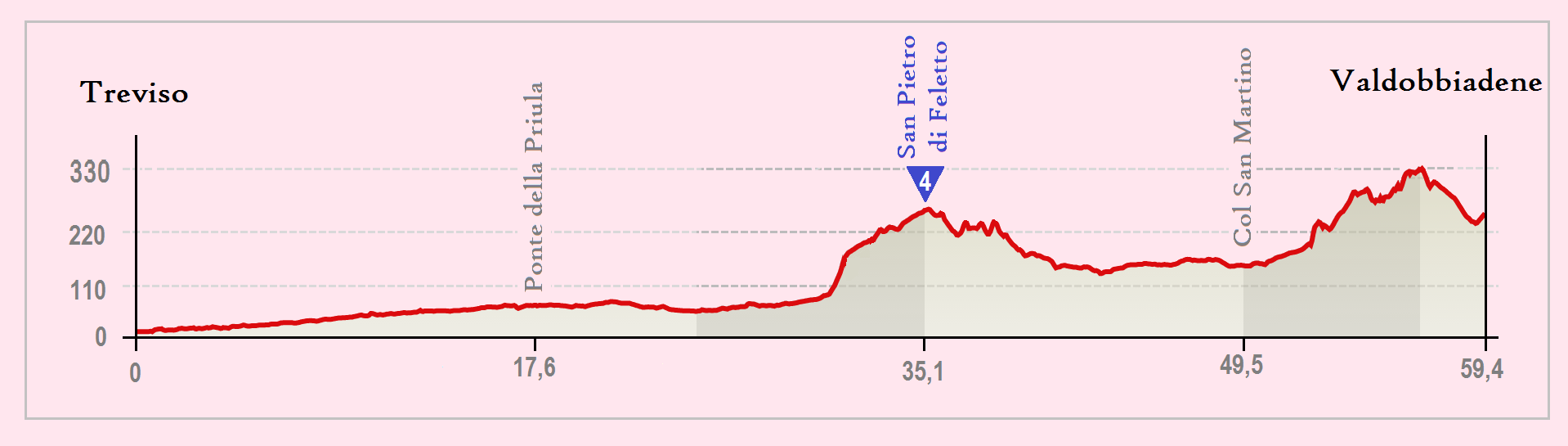 Perfil de la 14.ª etapa del giro de Italia 2015